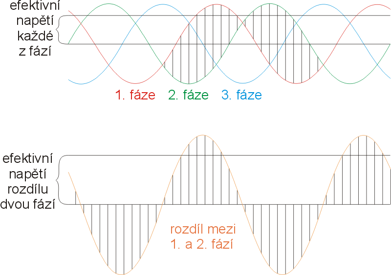 Napětí v trojfázové soustavě.